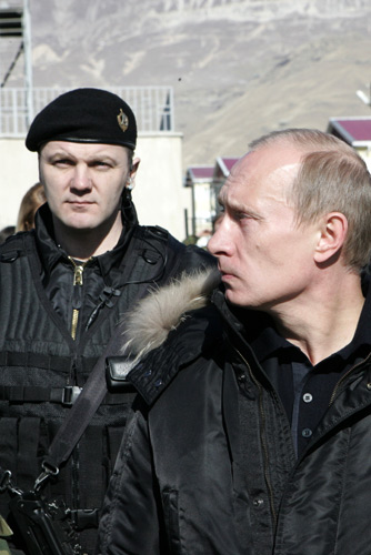 Во время посещения военных объектов на Северном Кавказе.